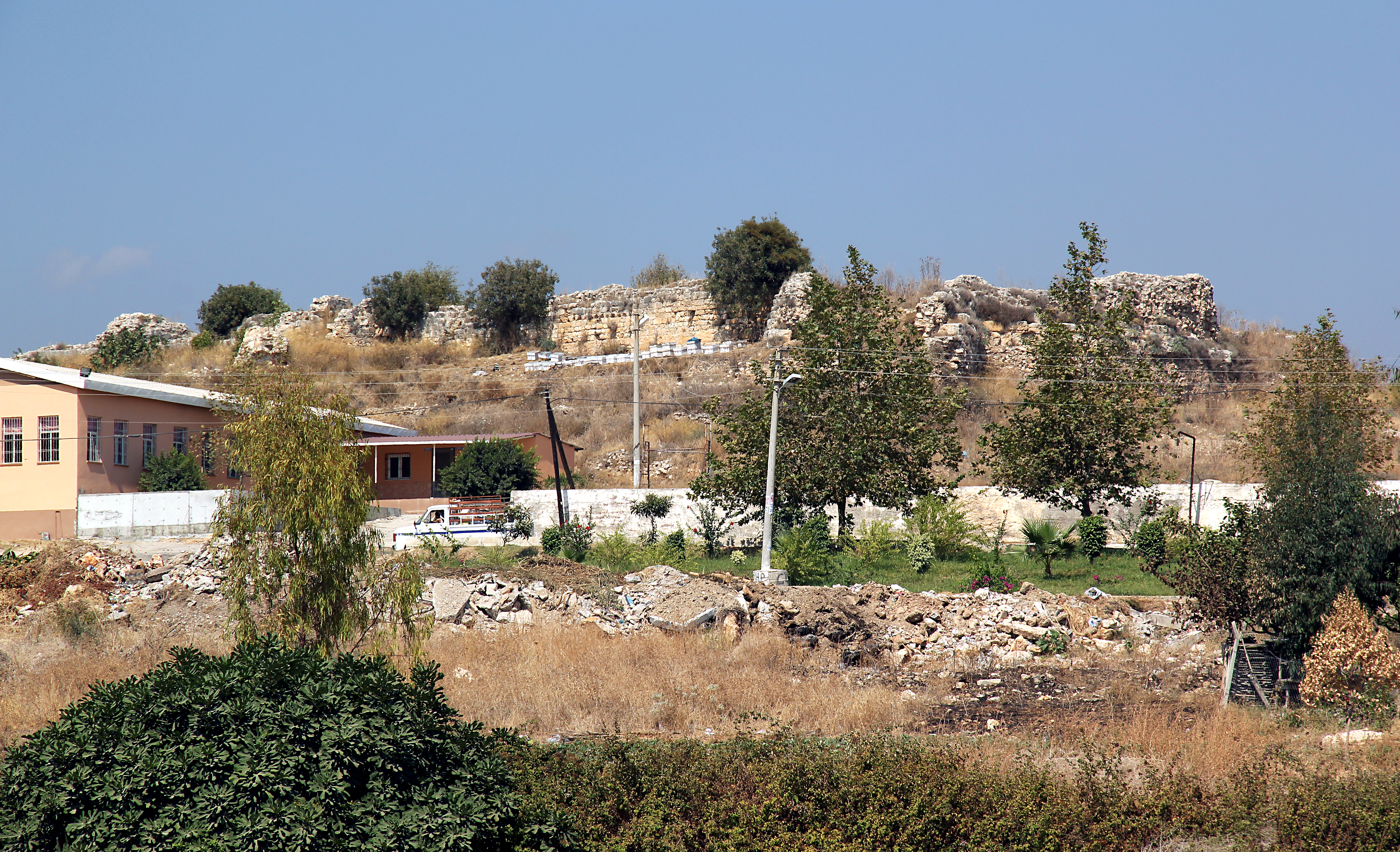 Lamos Kalesi, wahrscheinlich römische Burg in Limonlu bei Erdemli, Südtürkei